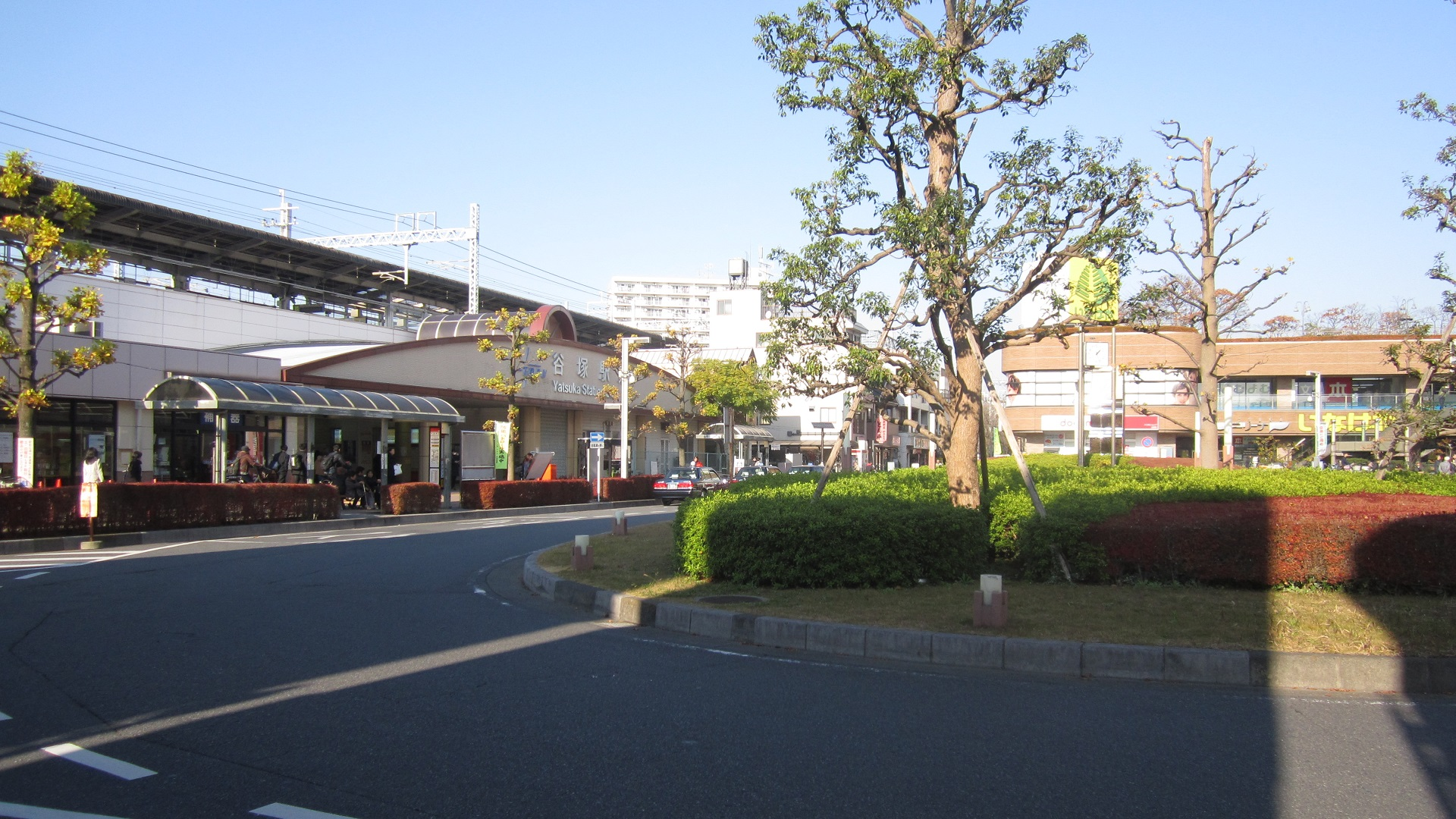 Das ist stations Foto von Japan.